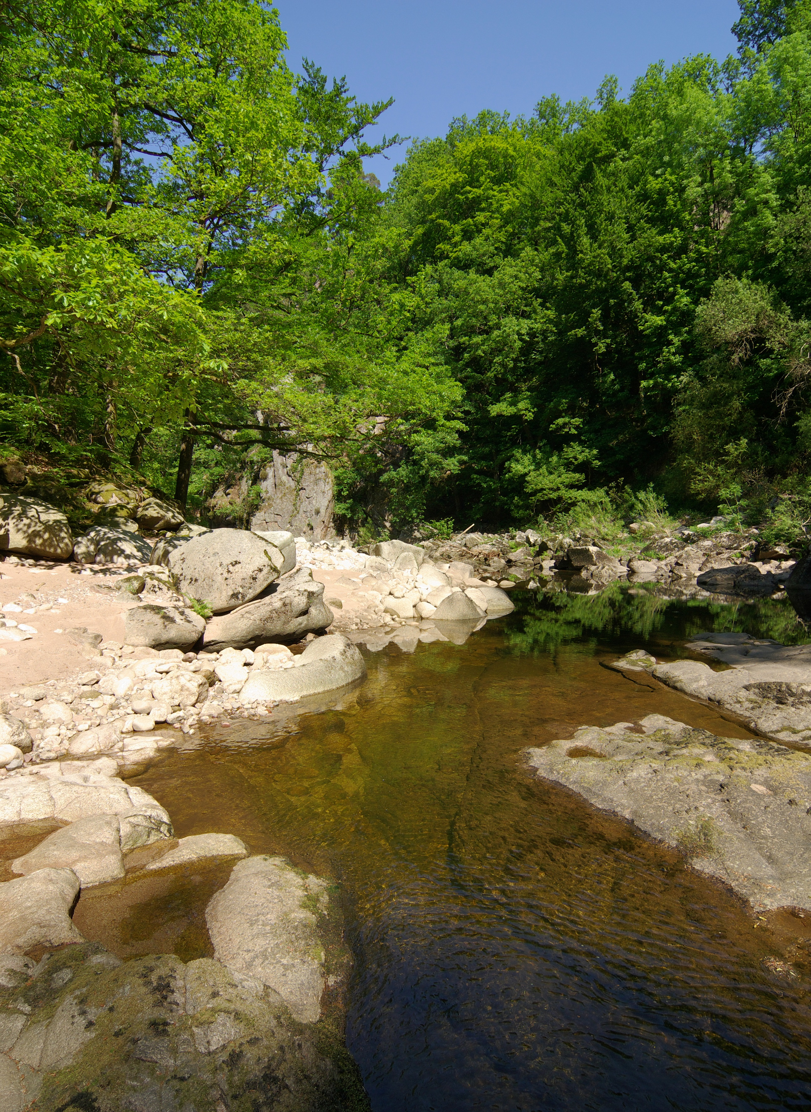 Murg zwischen Forbach-Langenbrand und Weisenbach. Flussbett im Forbachgranit. Ein großer Teil des Murgwassers wird vor dieser Murgschleife zur Energieerzeugung in einen Stollen abgezweigt. Schutzgebiete: Landschaftsschutzgebiet 2.16.005 Mittleres Murgtal FFH-Gebiet 7216341 Unteres Murgtal und Seitentäler Naturpark Schwarzwald Mitte/Nord